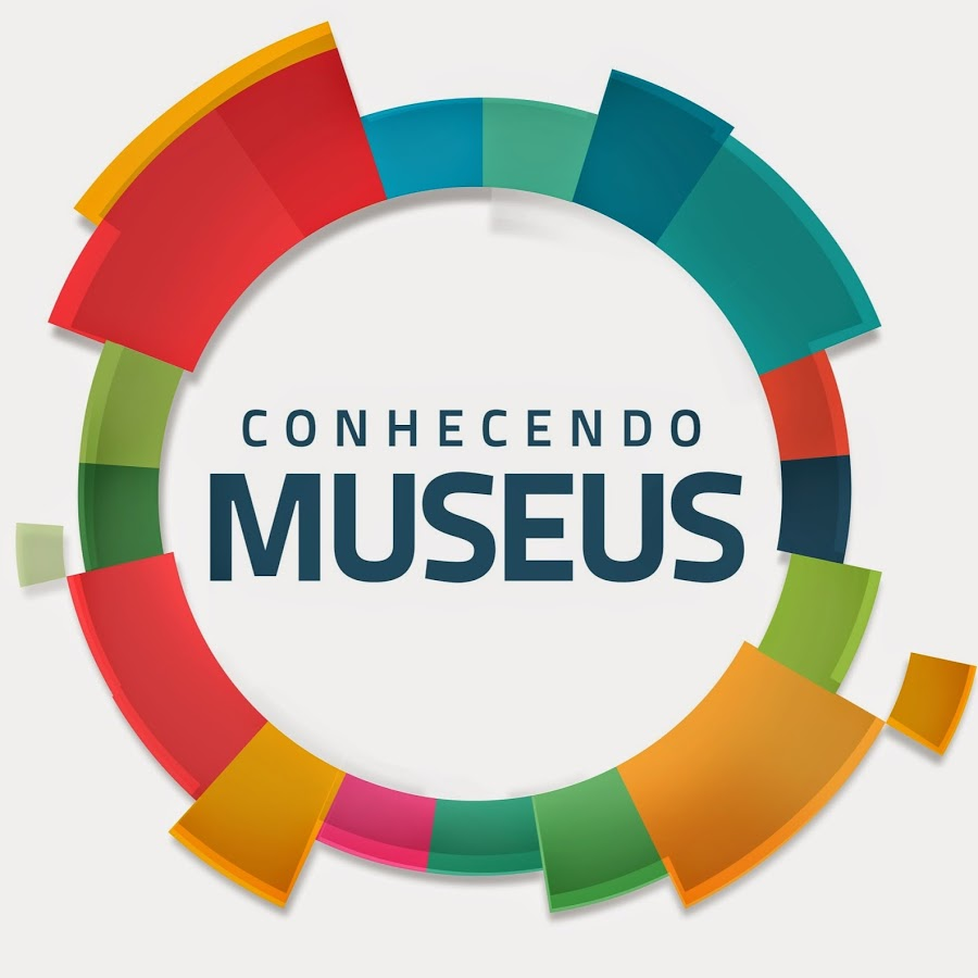 Logo do programa Conhecendo Museus